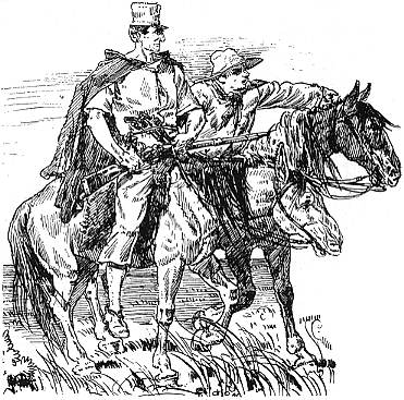 Karl-May-Figuren Jemmy und Davy – Illustration aus der Zeitschrift Der Gute Kamerad vom Januar 1887 (erstes Bild der Erzählung Der Sohn des Bärenjägers)